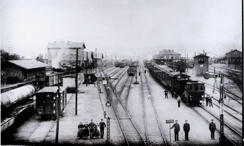 Blick von Norden her auf den Bahnhof Bebra